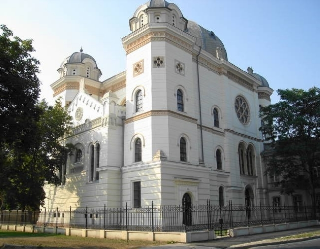 győri zsinagóga